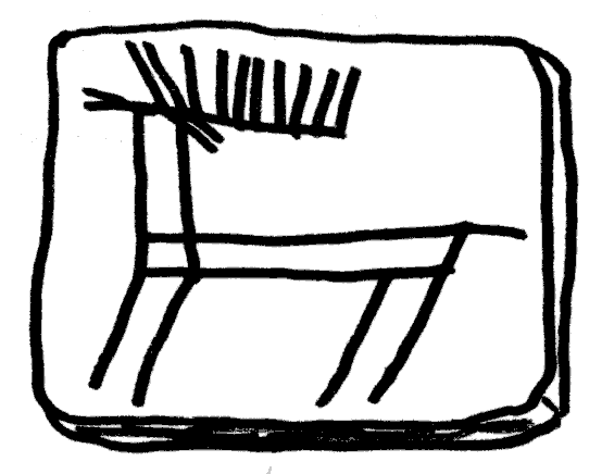 Plaqueta grabada con cérvido del castro portugués de Vila Nova de São Pedro (Portugal)/grave platelet with deer from the Portuguese castle New home of Saint Peter (Portugal)